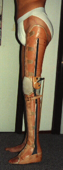 eigen foto van een orthese/beugel